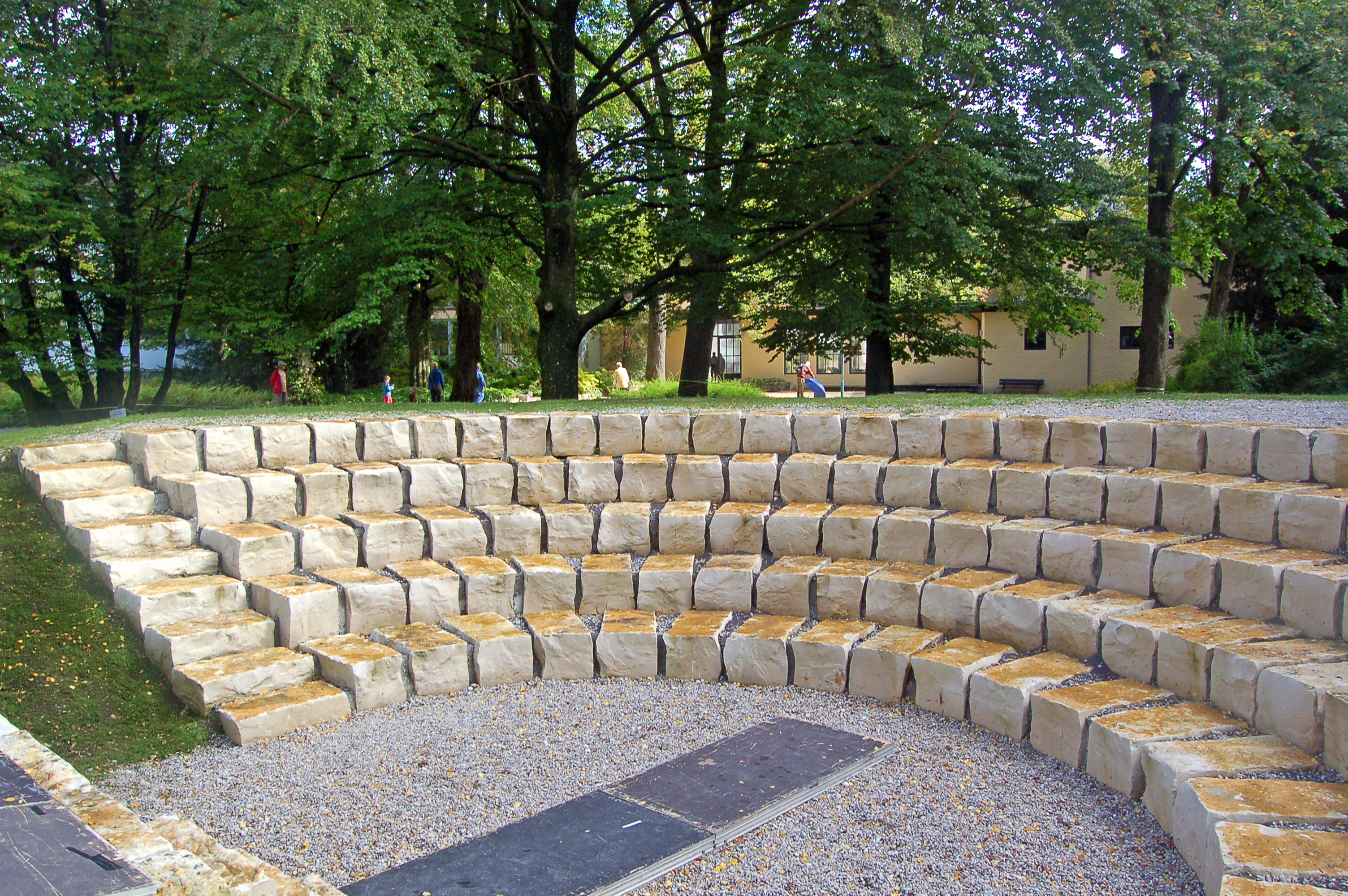 Das Amphitheater im Michael-Ende Kurpark in Garmisch-Partenkirchen (nach dem Roman Momo)